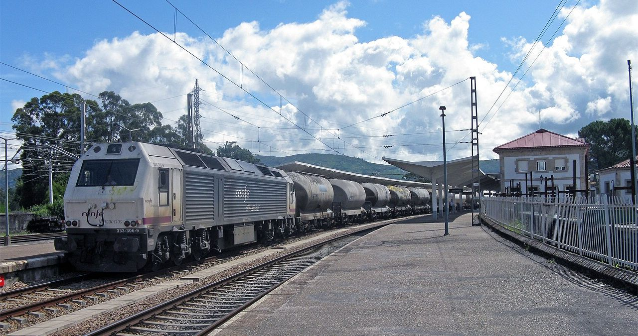 Redondela de Galicia